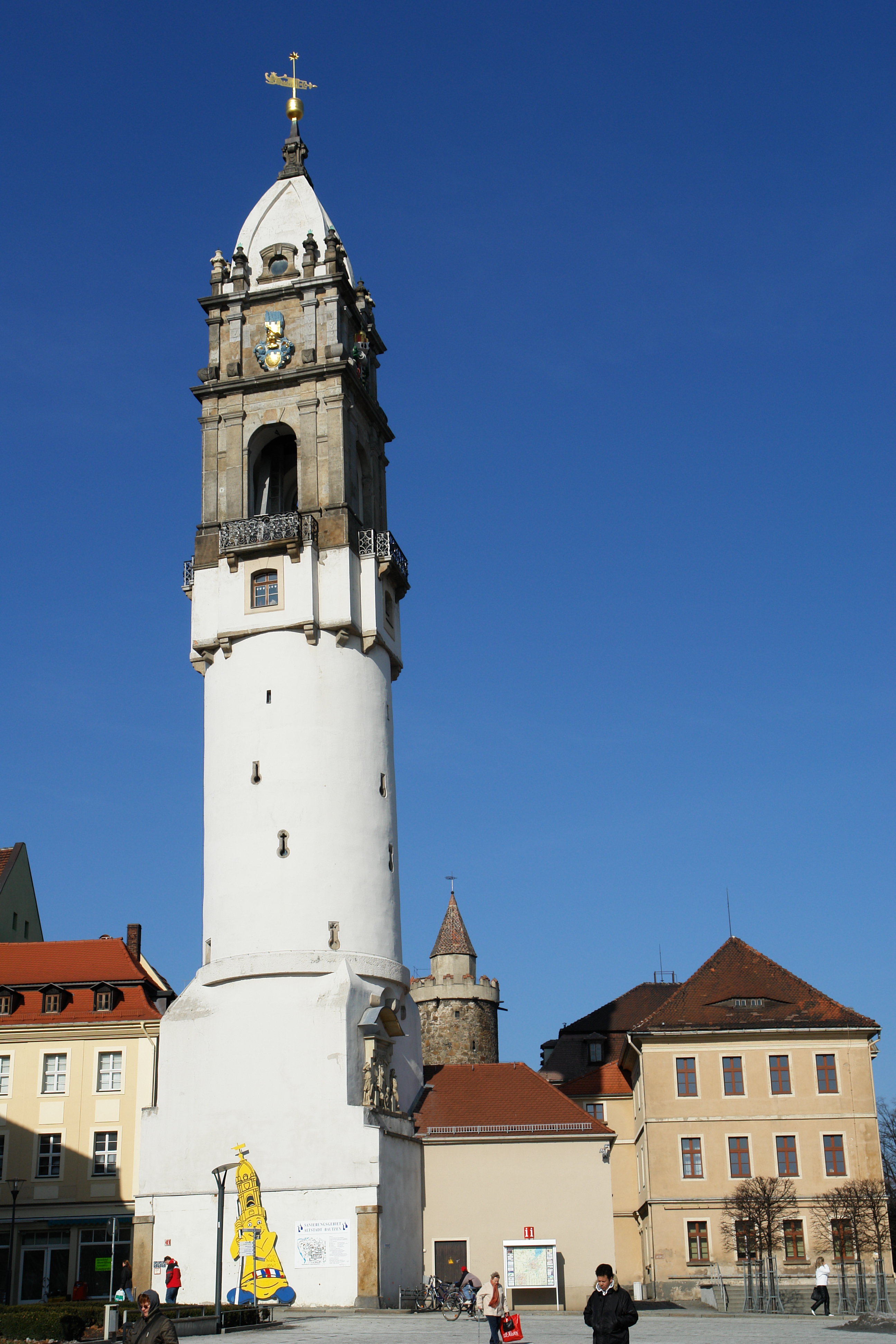 Reichenturm in Bautzen. Hornjoserbsce: Bohata wěža w Budyšinje.